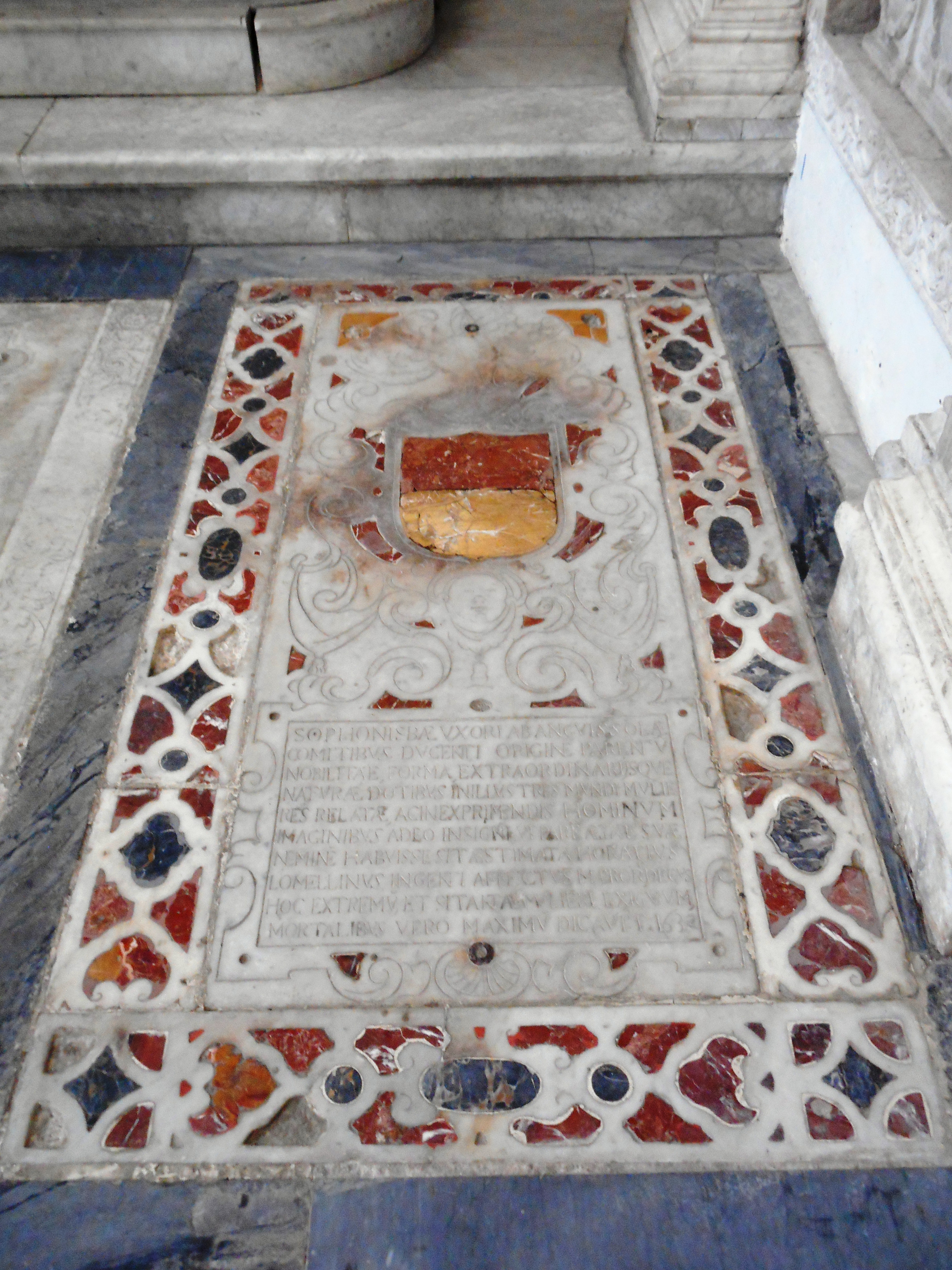 Lapide della tomba di Sofonisba Anguissola nella chiesa di San Giorgio dei Genovesi a Palermo